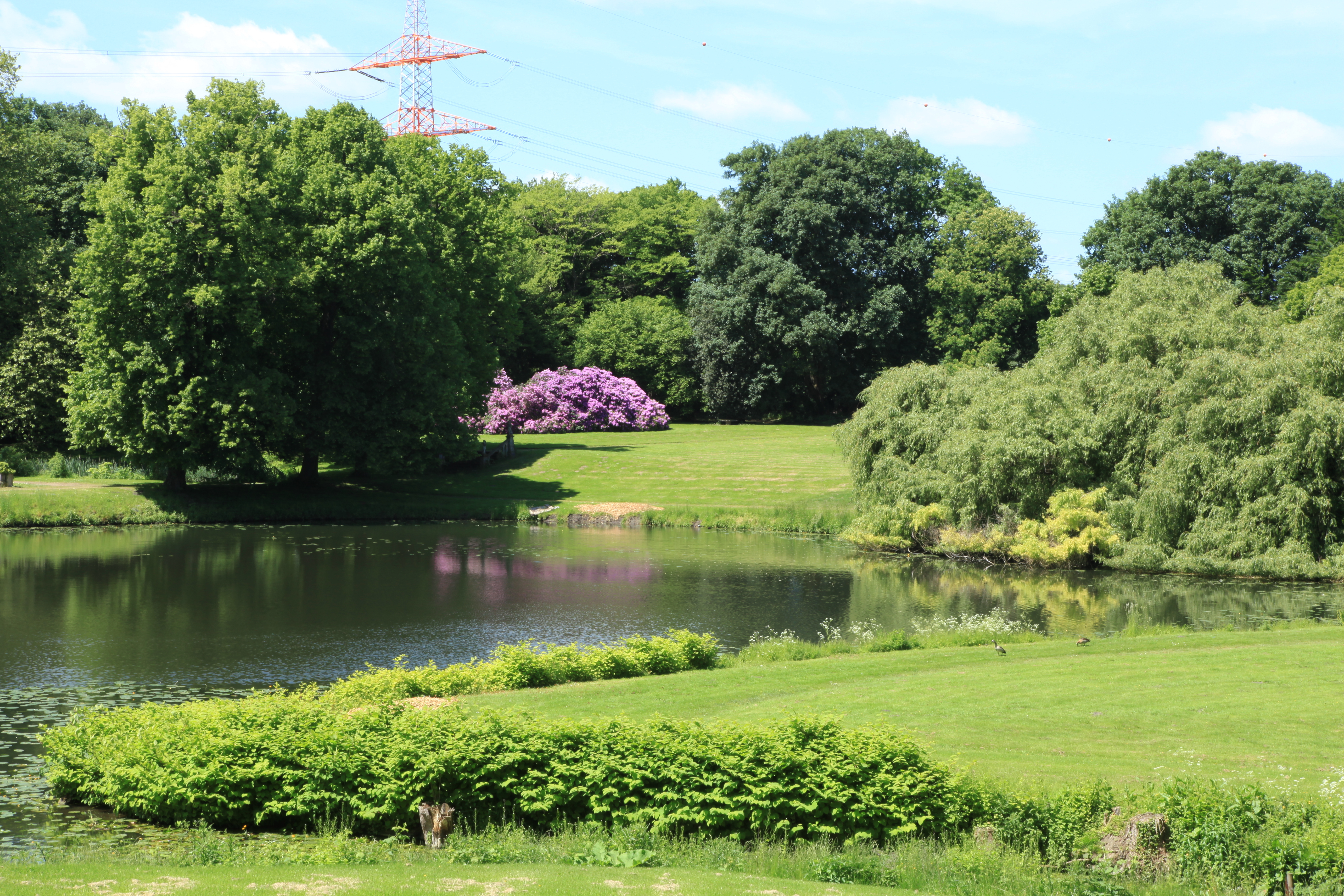 Park des Wasserschlosses Haus Bodelschwingh, Schloßstraße in Dortmund